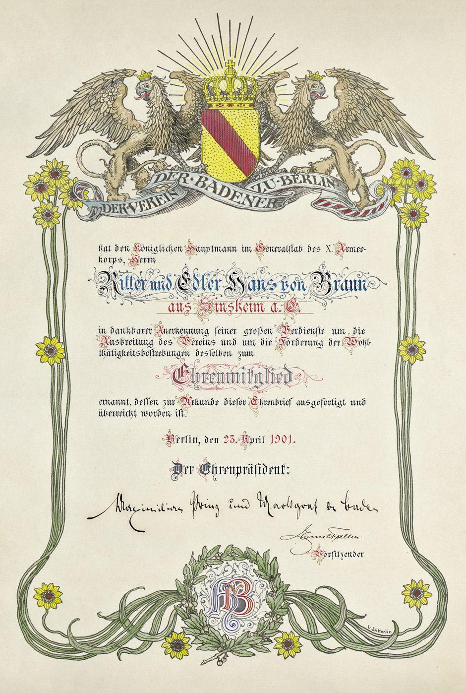 Urkunde "Der Verein der Badener zu Berlin hat den Königlichen Hauptmann im Generalstab des X. Armeekorps, Herrn Ritter und Edler Hans von Braun aus Sinsheim a. G. in dankbarer Anerkennung seiner großen Verdienste um die Ausbreitung des Vereins ... zum Ehrenmitglied ernannt ..."; unterschrieben von Max von Baden (1867–1929), Berlin 23. April 1901; 50,5 x 37 cm